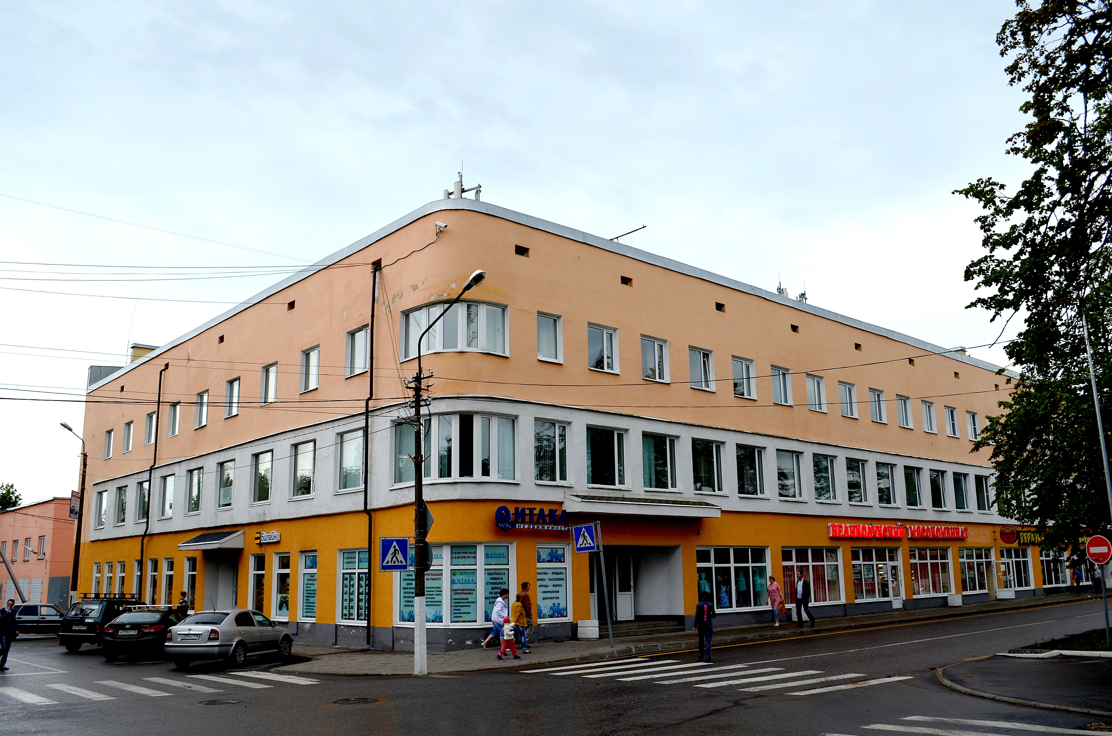 Приозерск. Калинина ул. 11. Общественное городское здание (архитектор Ялмари Ланкинен). 1939 г.